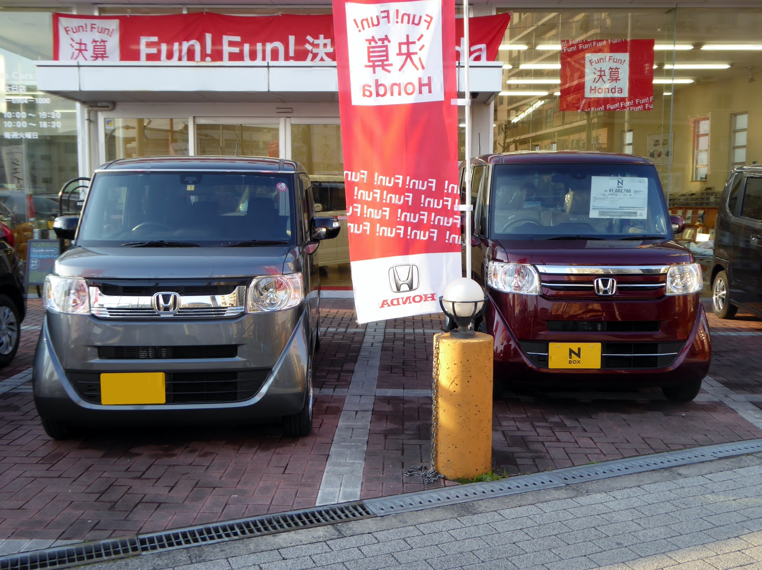 JF1型ホンダ・N-BOXとN-BOXスラッシュをそれぞれフロントから撮影。